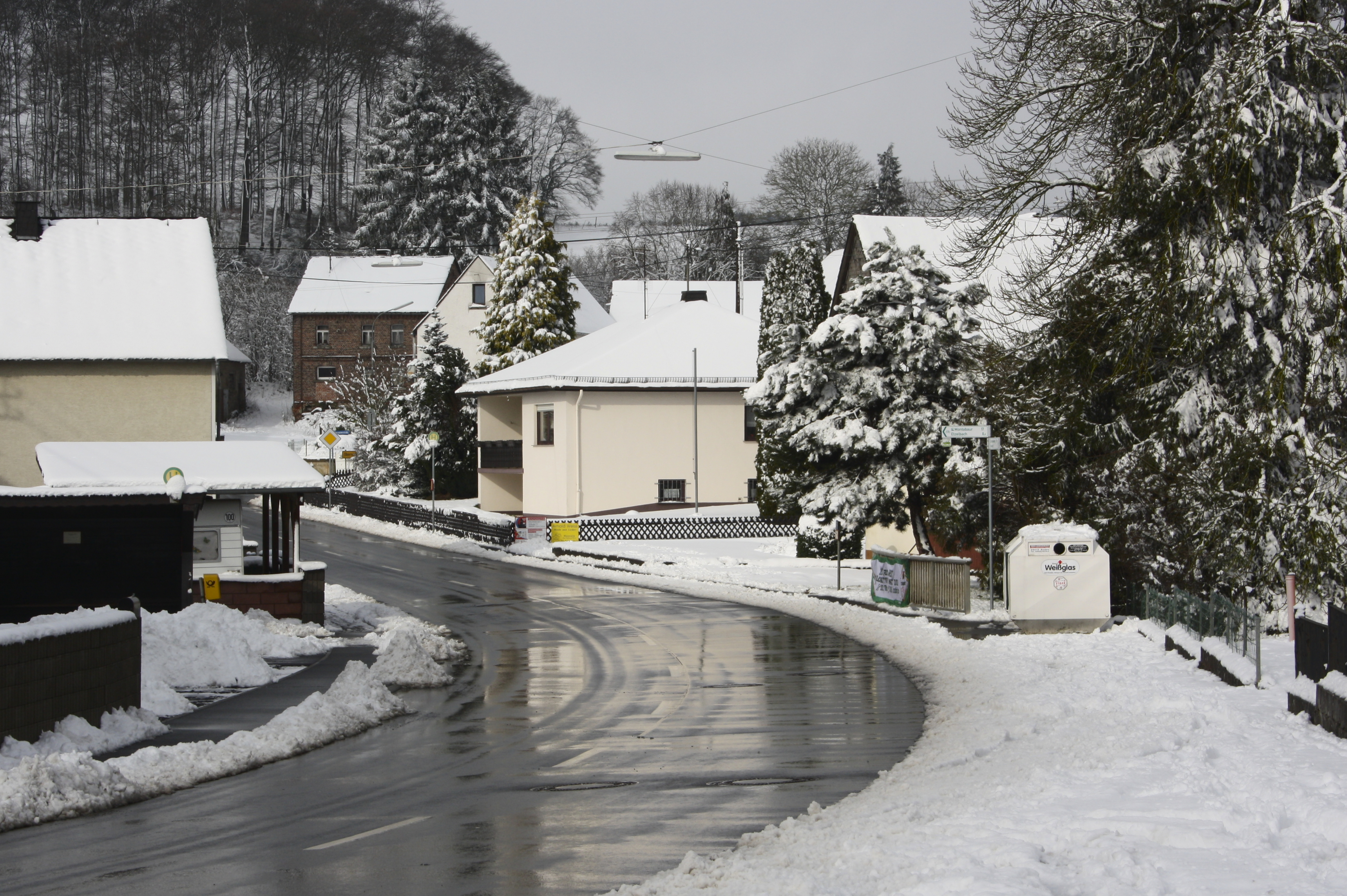 Arnshöfen, Westerwaldkreis, Rheinland-Pfalz, Deutschland